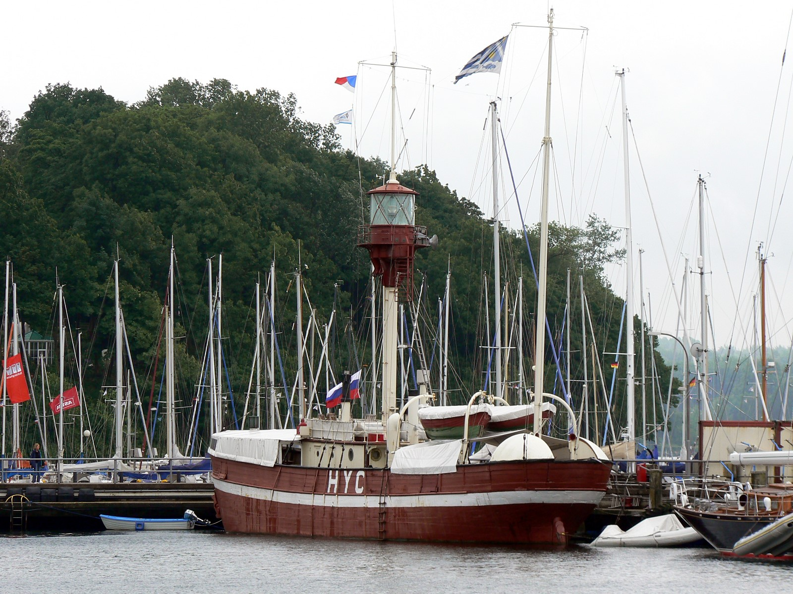 Feuerschiff No. XV Læsø Rende im Hafen von Möltenort. Stapellauf: 04.01.1887 (Kopenhagen), seit 1986 als schwimmendes Vereinsheim des Heikendorfer Yacht Club HYC'86 genutzt.